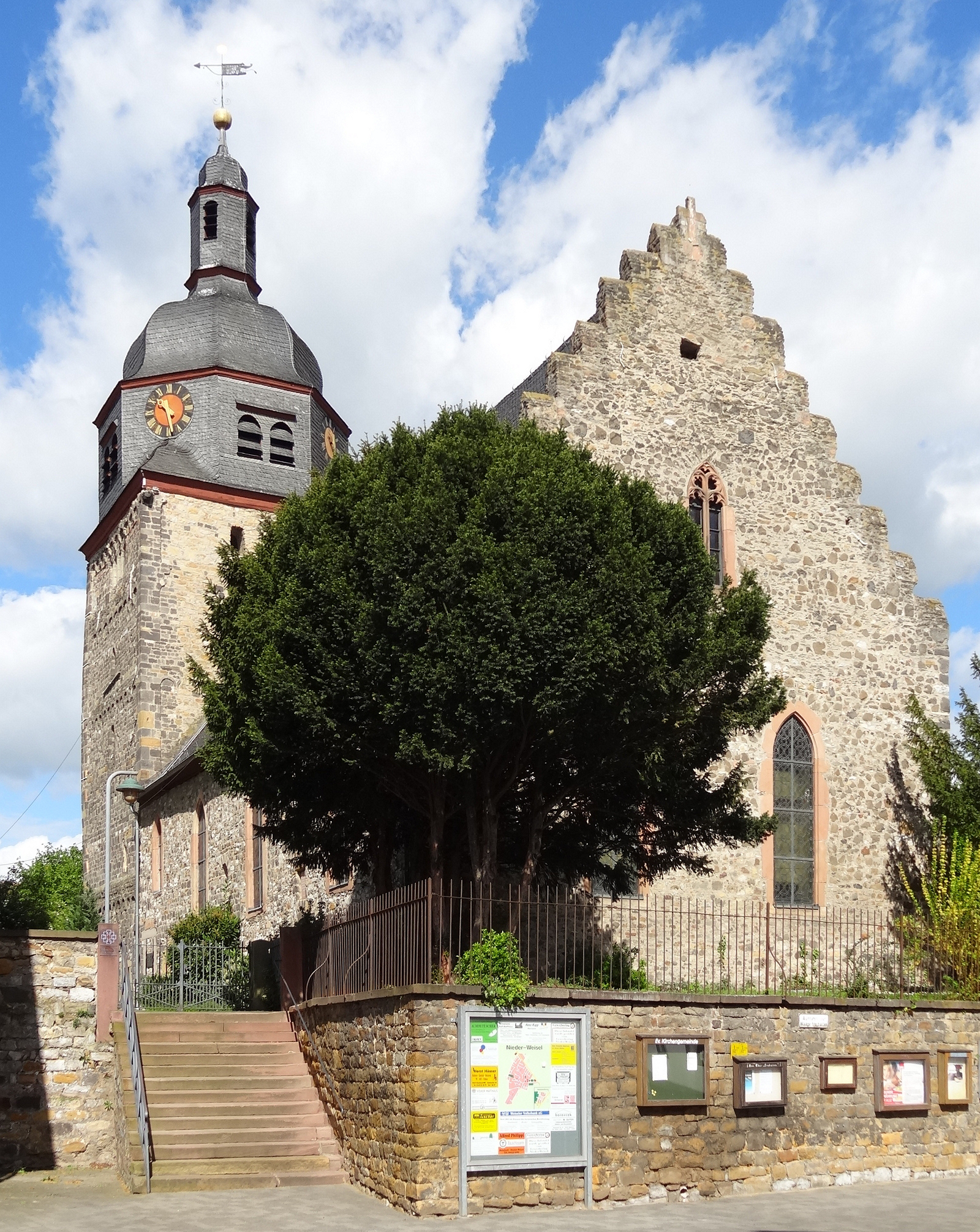 Evangelische Pfarrkirche (Nieder-Weisel)